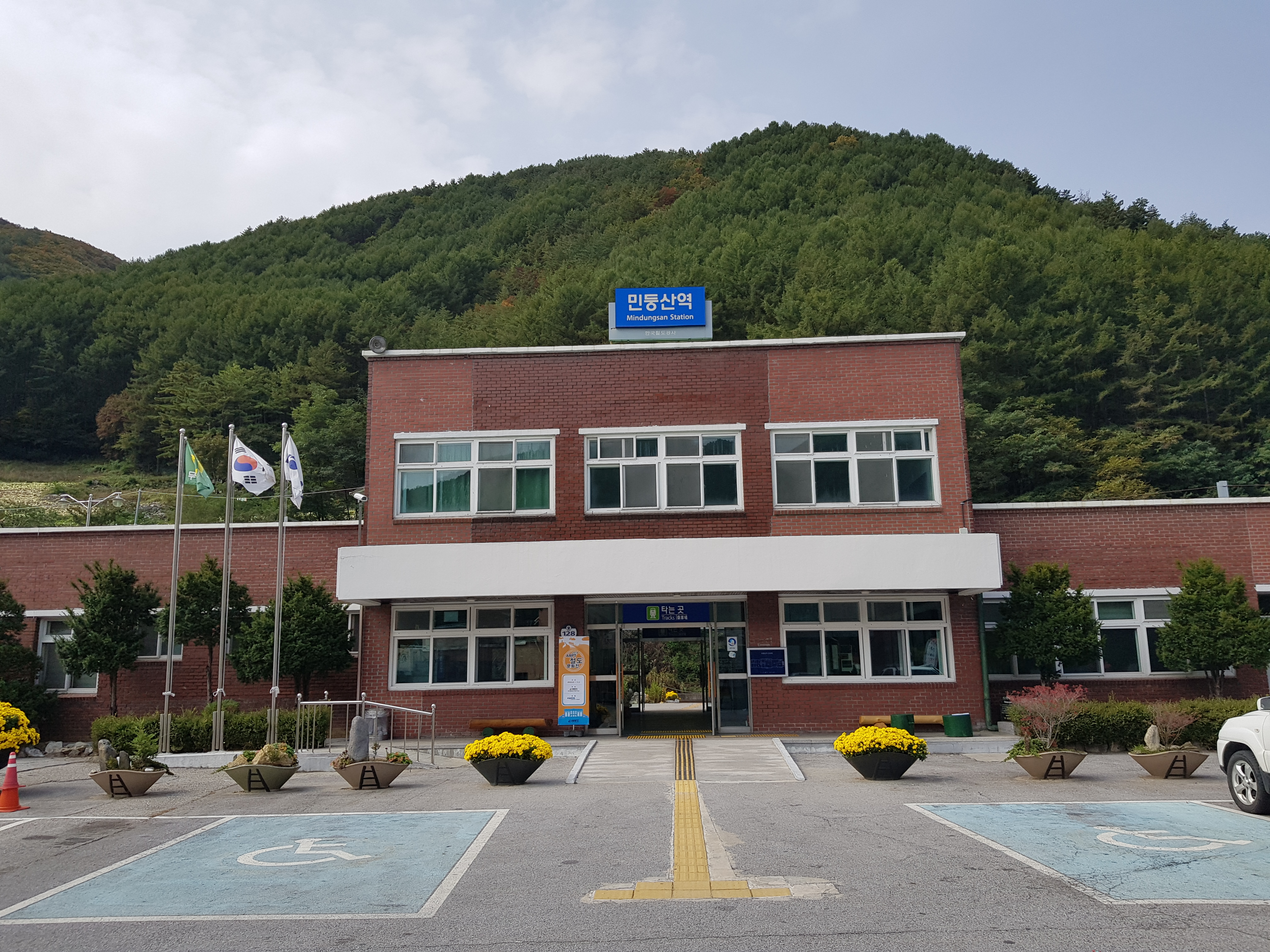 2018년 10월 9일에 촬영된 민둥산역의 모습